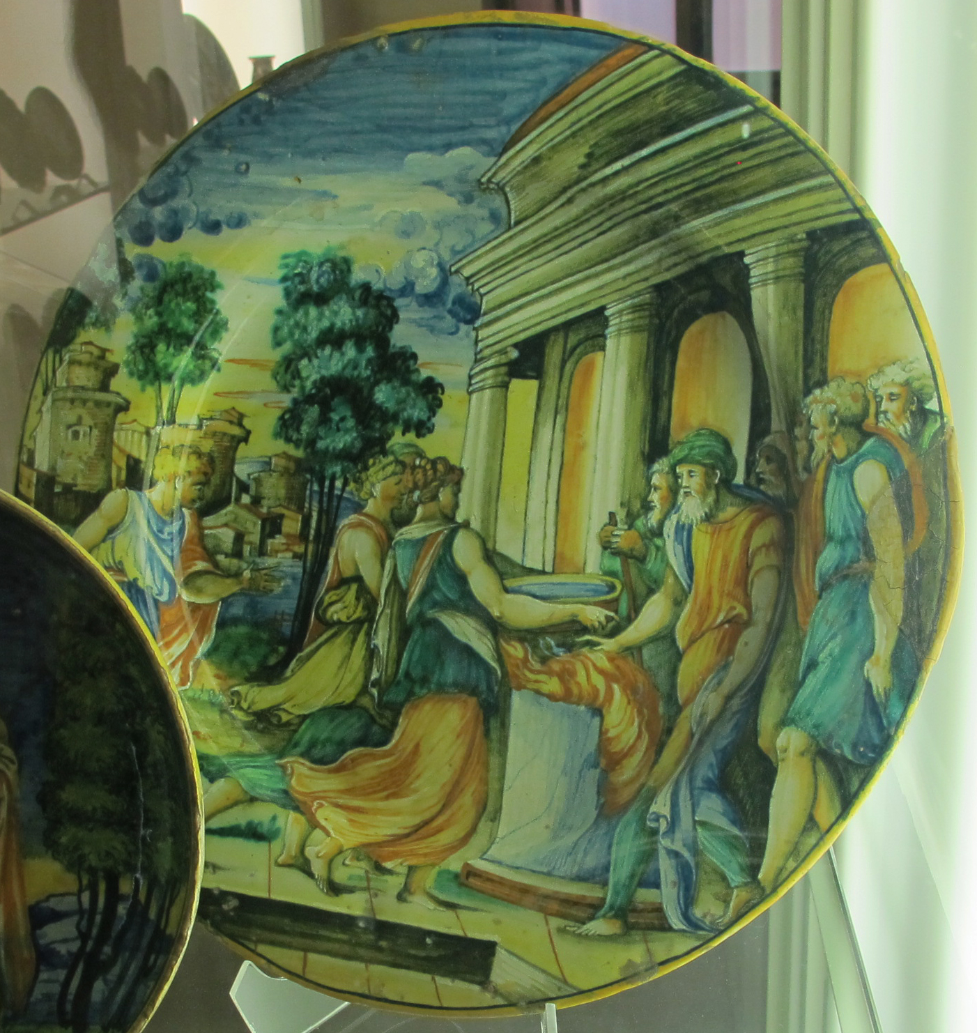 Museo Nazionale d'Arte Medievale e Moderna - MIBAC This is a photo of a monument which is part of cultural heritage of Italy.